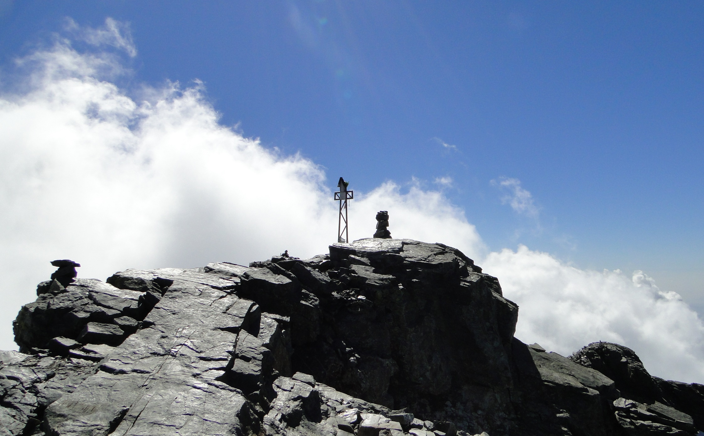 Vetta del pizzo Redorta, Prealpi Orobie (BG)